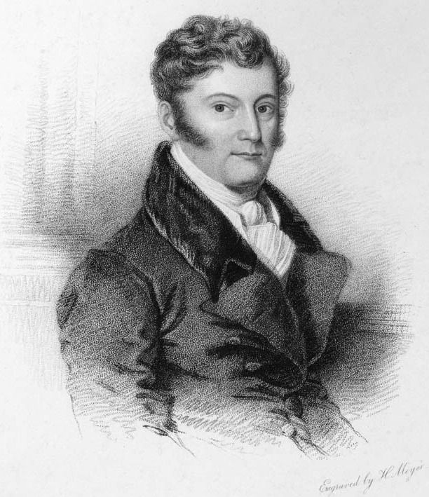 Maximilian zu Wied-Neuwied, German ethnographer